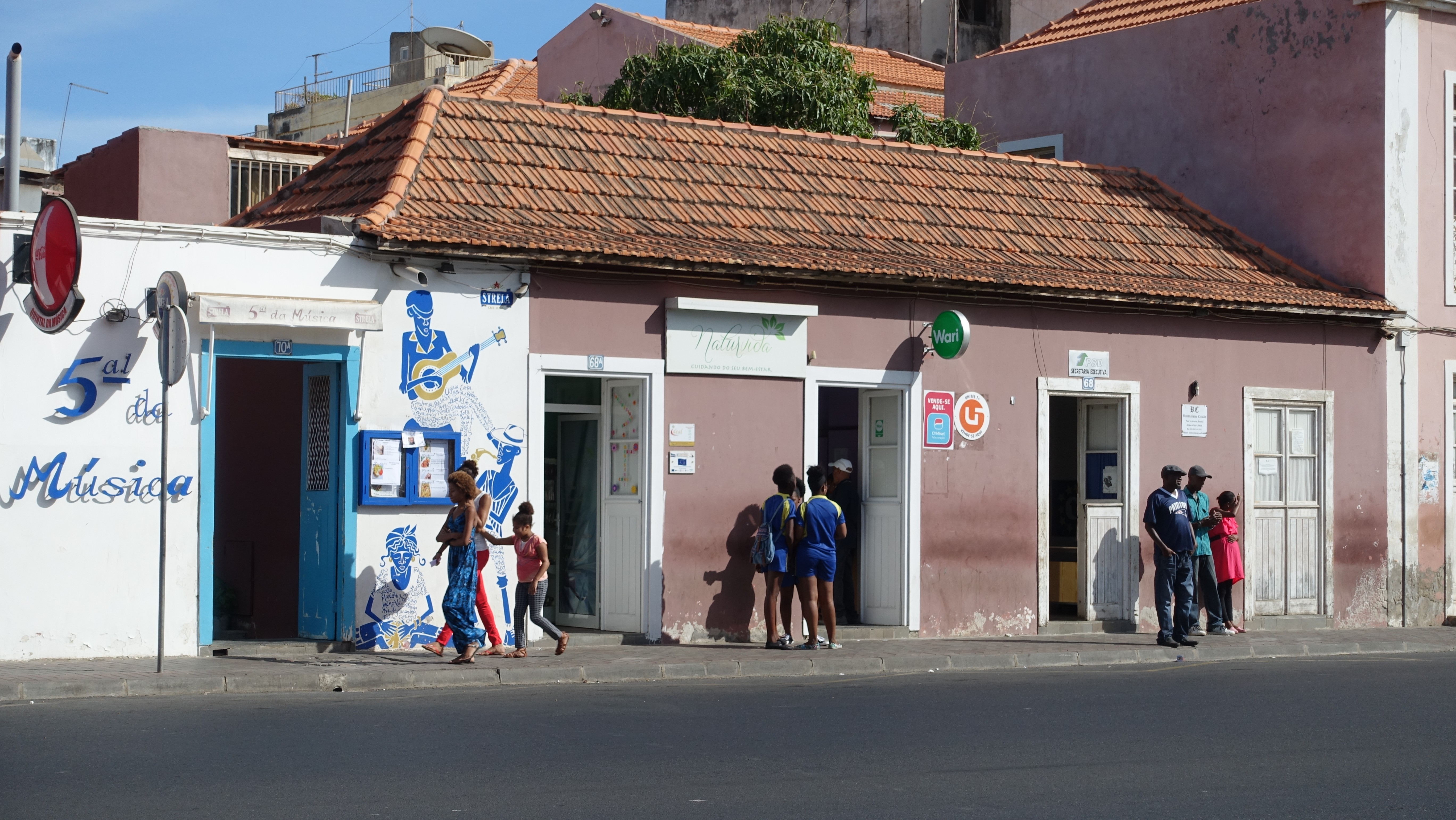 Praia - Musiklokal